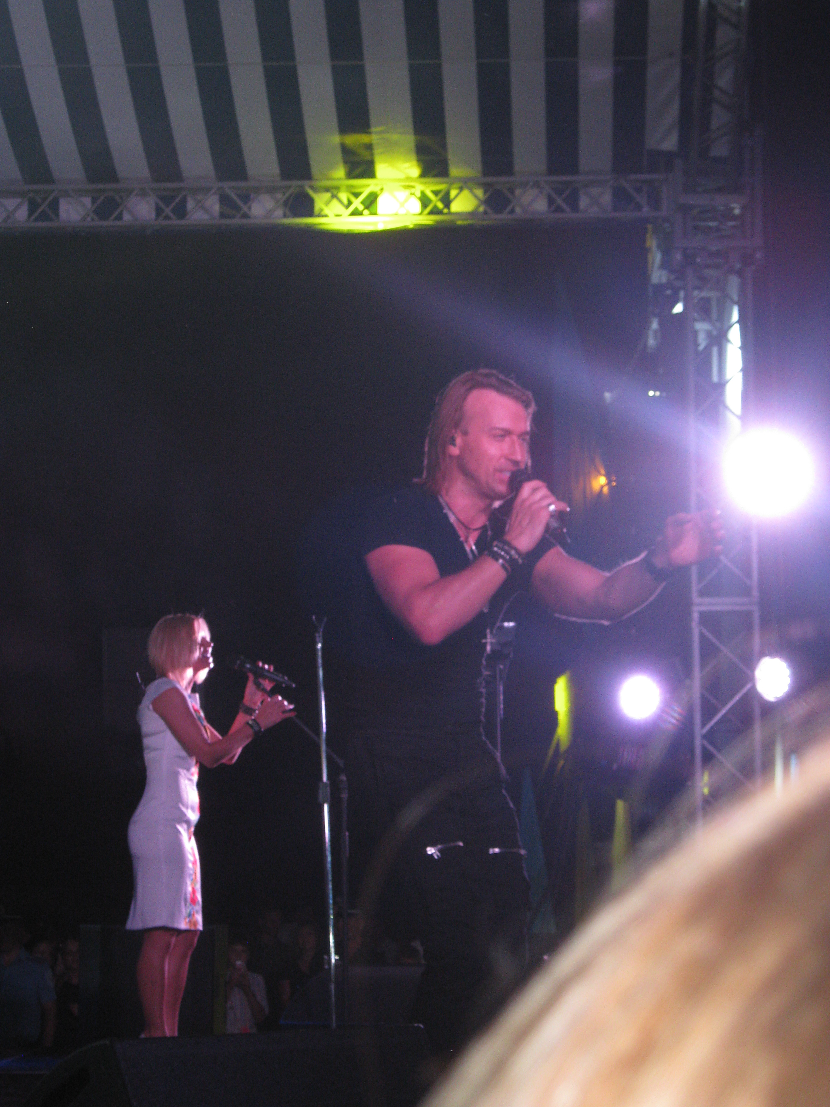 Олег Винник на концерті з нагоди Дня міста в Первомайську Миколаївської області.